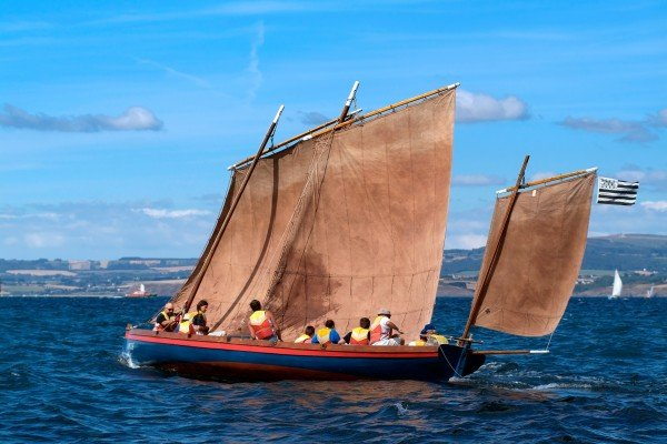 Yole de Bantry Amitié à la voile. Naviguant avec l'équipage de l'association Treizour, en baie de Douarnenez. Une yole de Bantry peut naviguer sous trois voiles. Le tapecul est à l'arrière, le taillevent ou grand-voile est au centre (c'est la voile principale du navire) et la misaine est à l'avant du bateau.